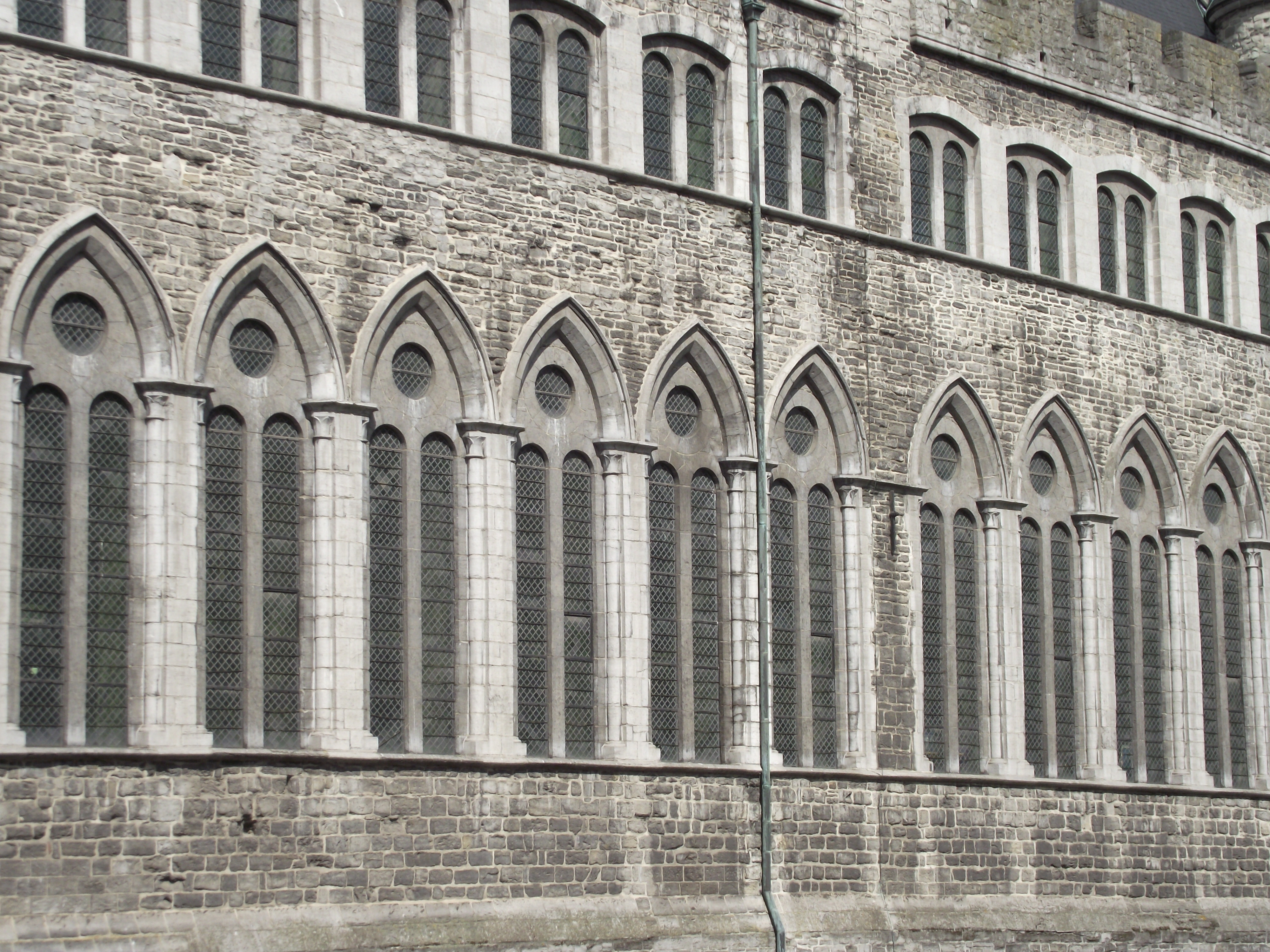 Geeraard de Duivelsteen, 13e eeuw